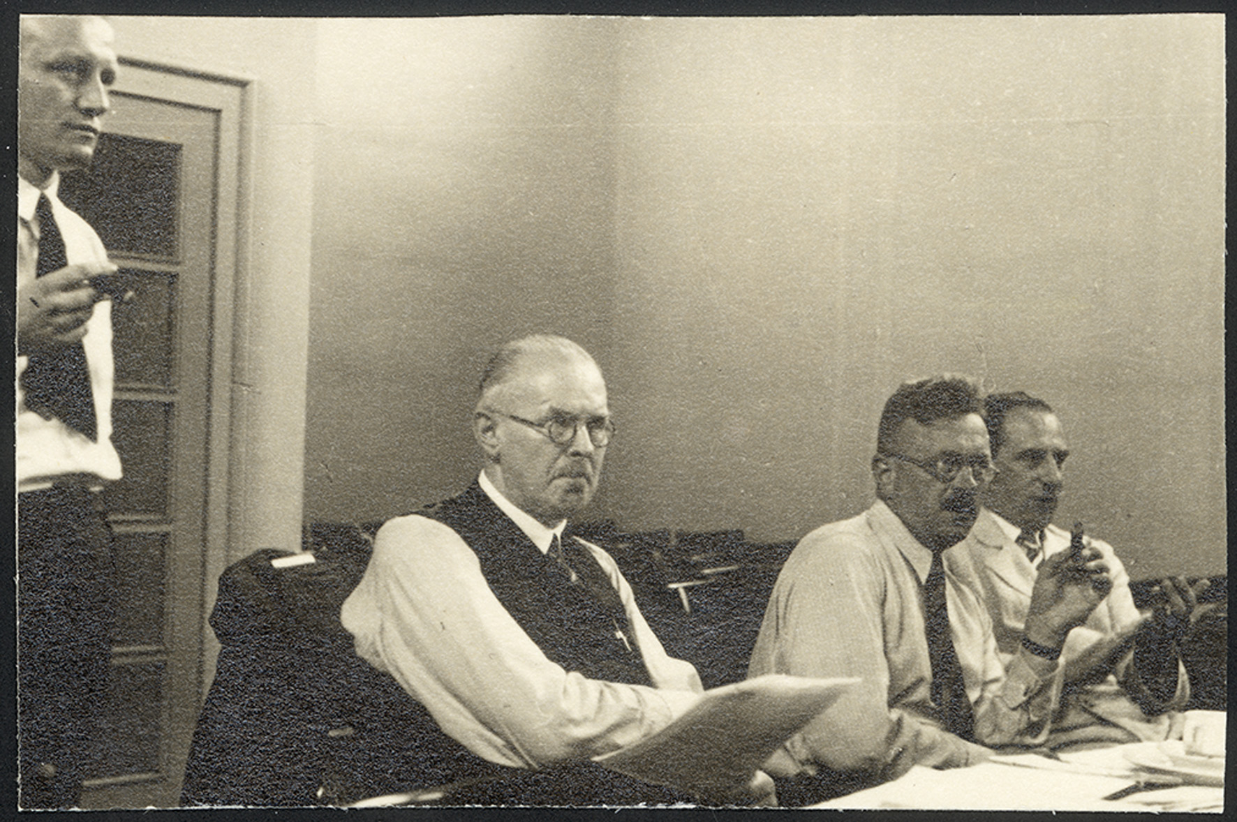 Joachim Beckmann, Paul Humburg, Johannes Schlingensiepen und Heinrich Held (vlnr) Freie Evangelische Synode, Barmen 3. und 4. Januar 1934, Abgabe: Heinz Joachim Held 05/2006 Bestand: AEKR Düsseldorf 8SL 046 (Bildarchiv), 80018_10